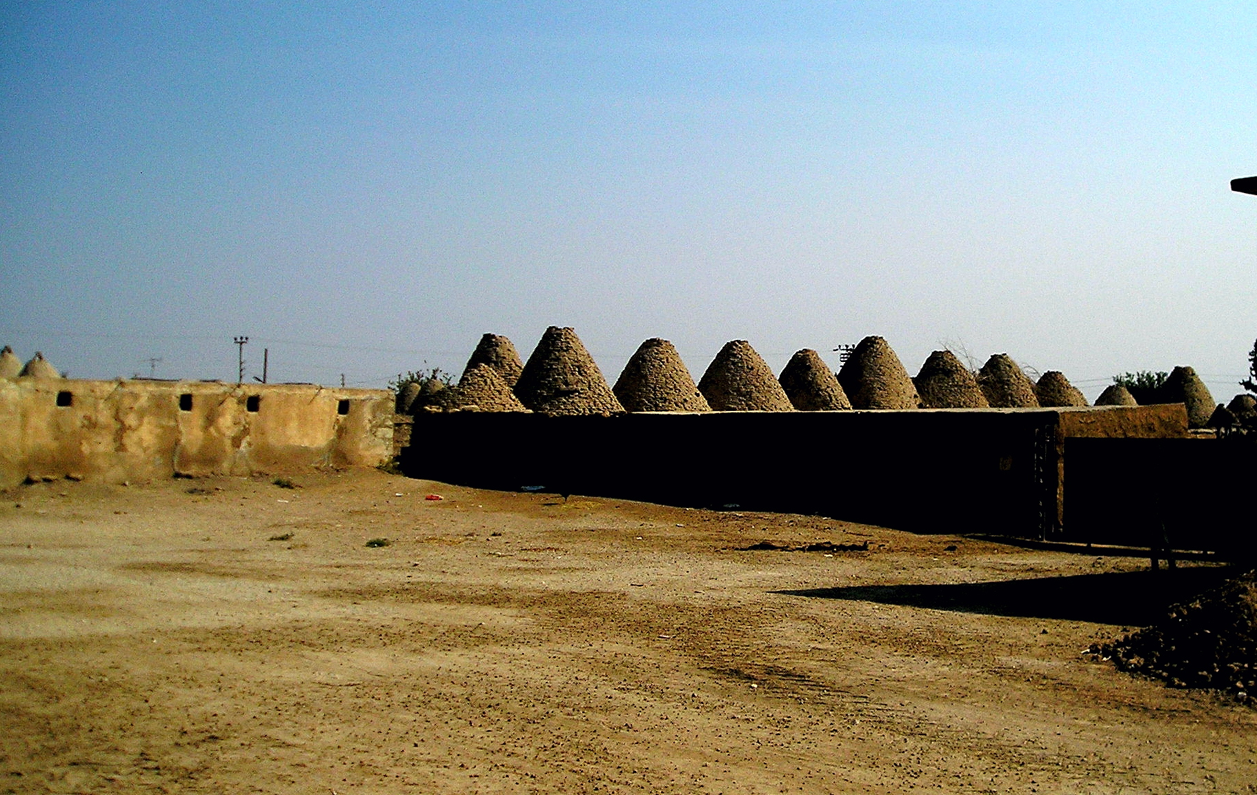 Harran beehive houses Harran, Şanlıurfa